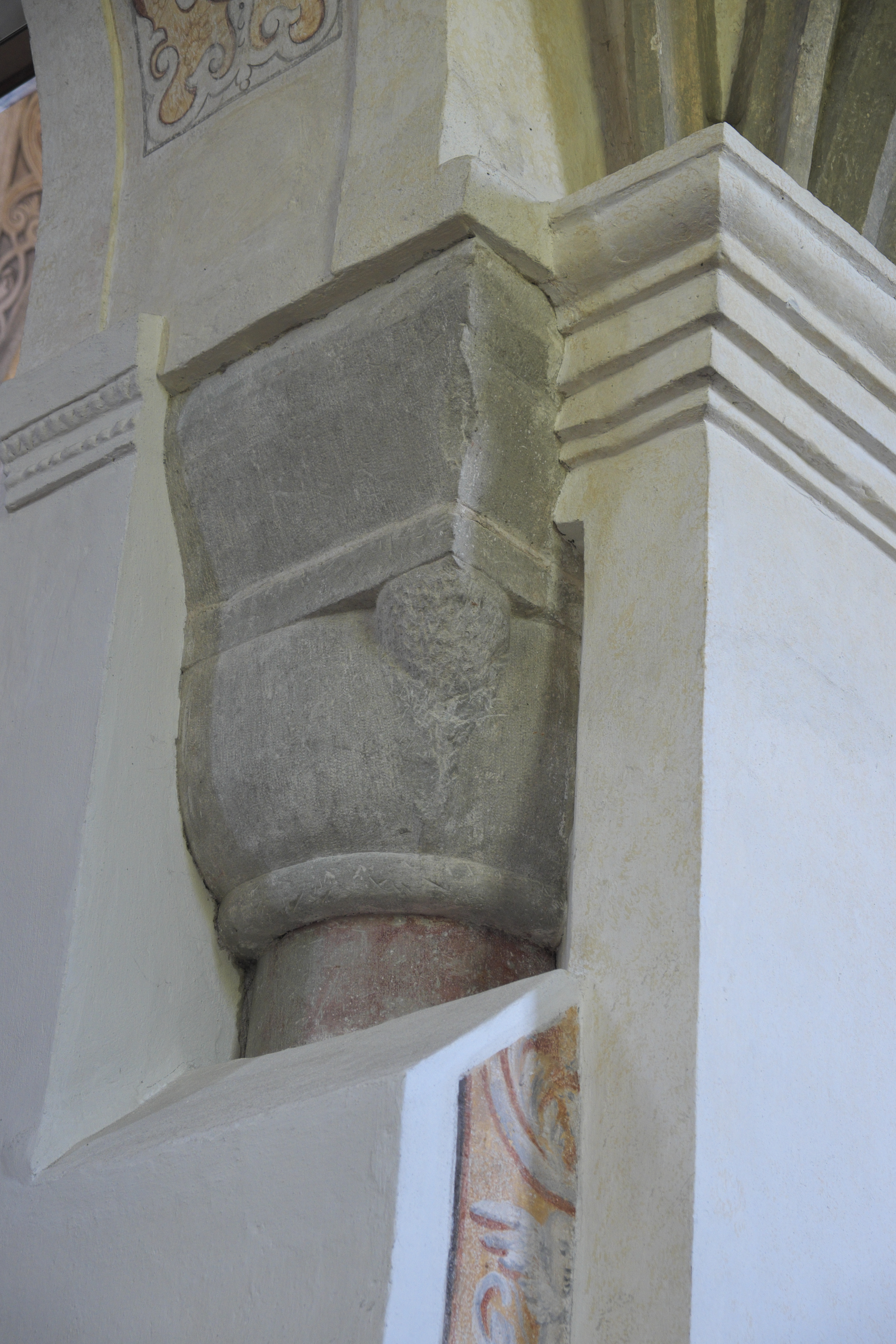 Katholische Pfarrkirche, ehemalige Benediktinerklosterkirche St. Lambert in Klosterseeon, einem Ortsteil von Seeon-Seebruck im Landkreis Traunstein (Bayern/Deutschland), freigelegte romanische Säule im Mittelschiff